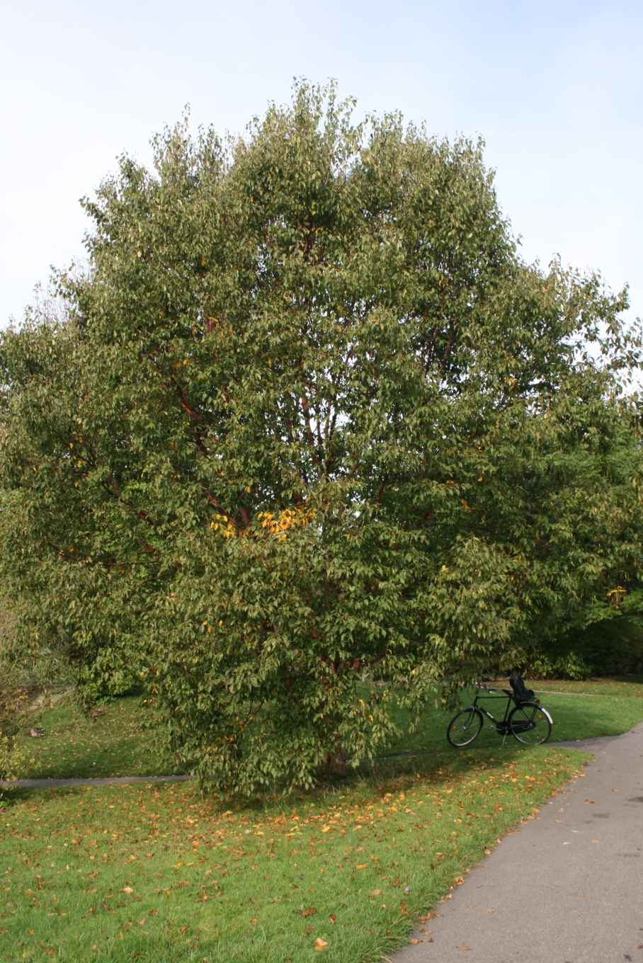 Betula albosinensis: Habit.